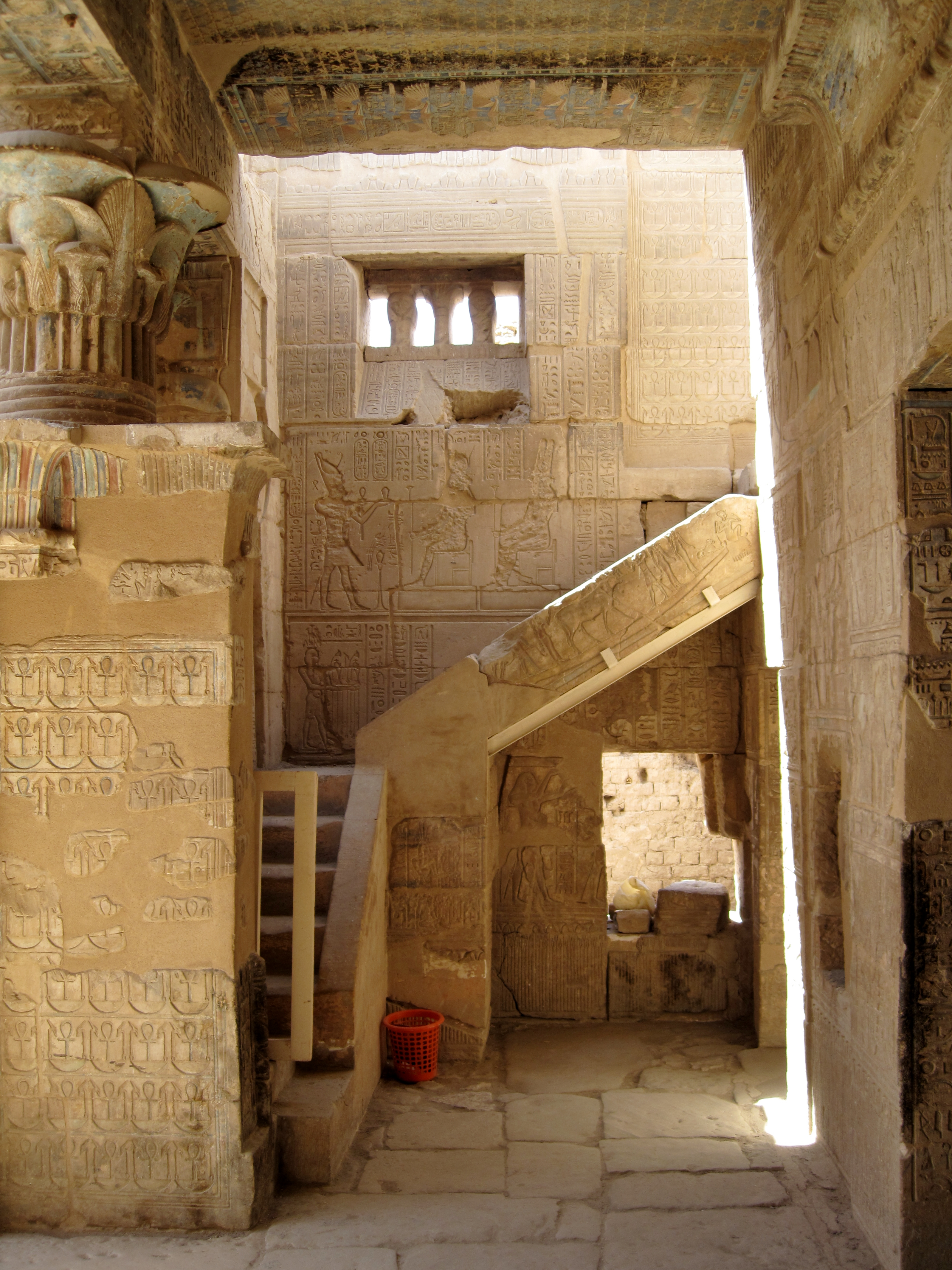 Treppe im Hathor-Tempel von Deir el-Medina („Kloster der Stadt“), altägyptisch Set Maat („Platz der Wahrheit“), in Theben-West bei Luxor, Ägypten